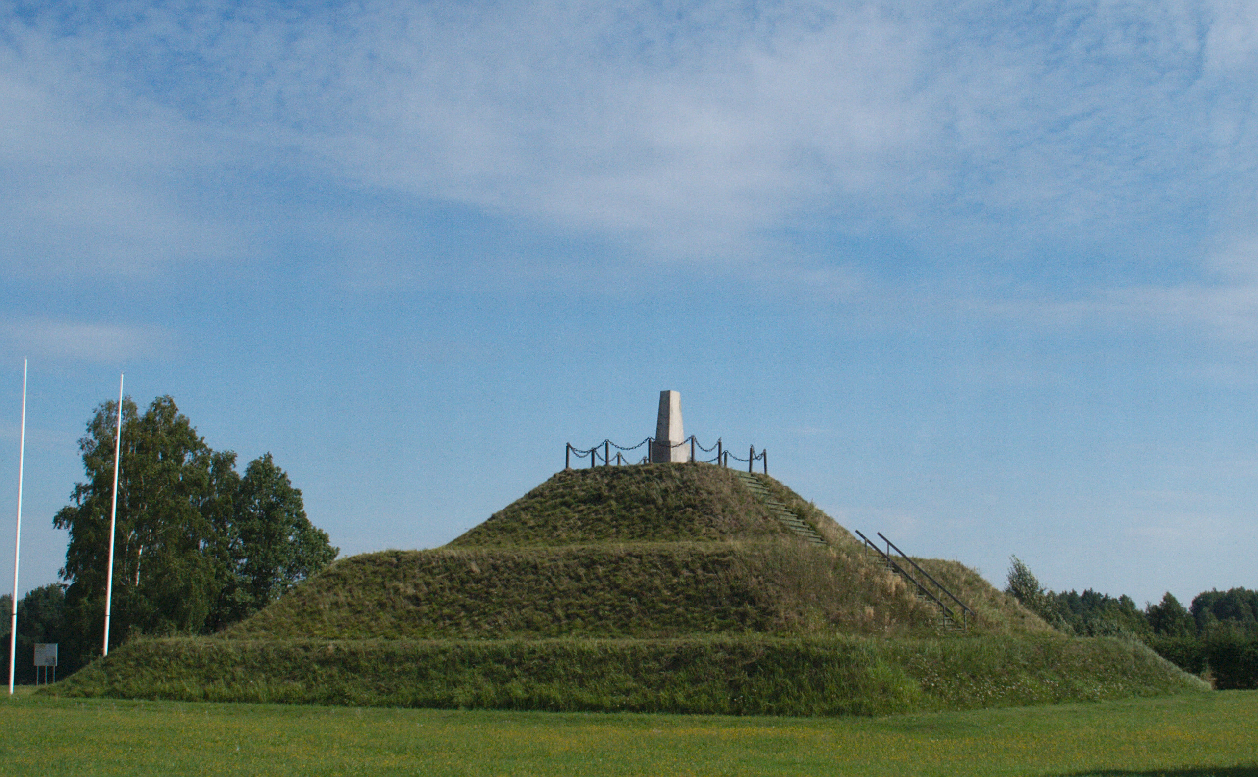 Vabadussõja Paju lahingu koht